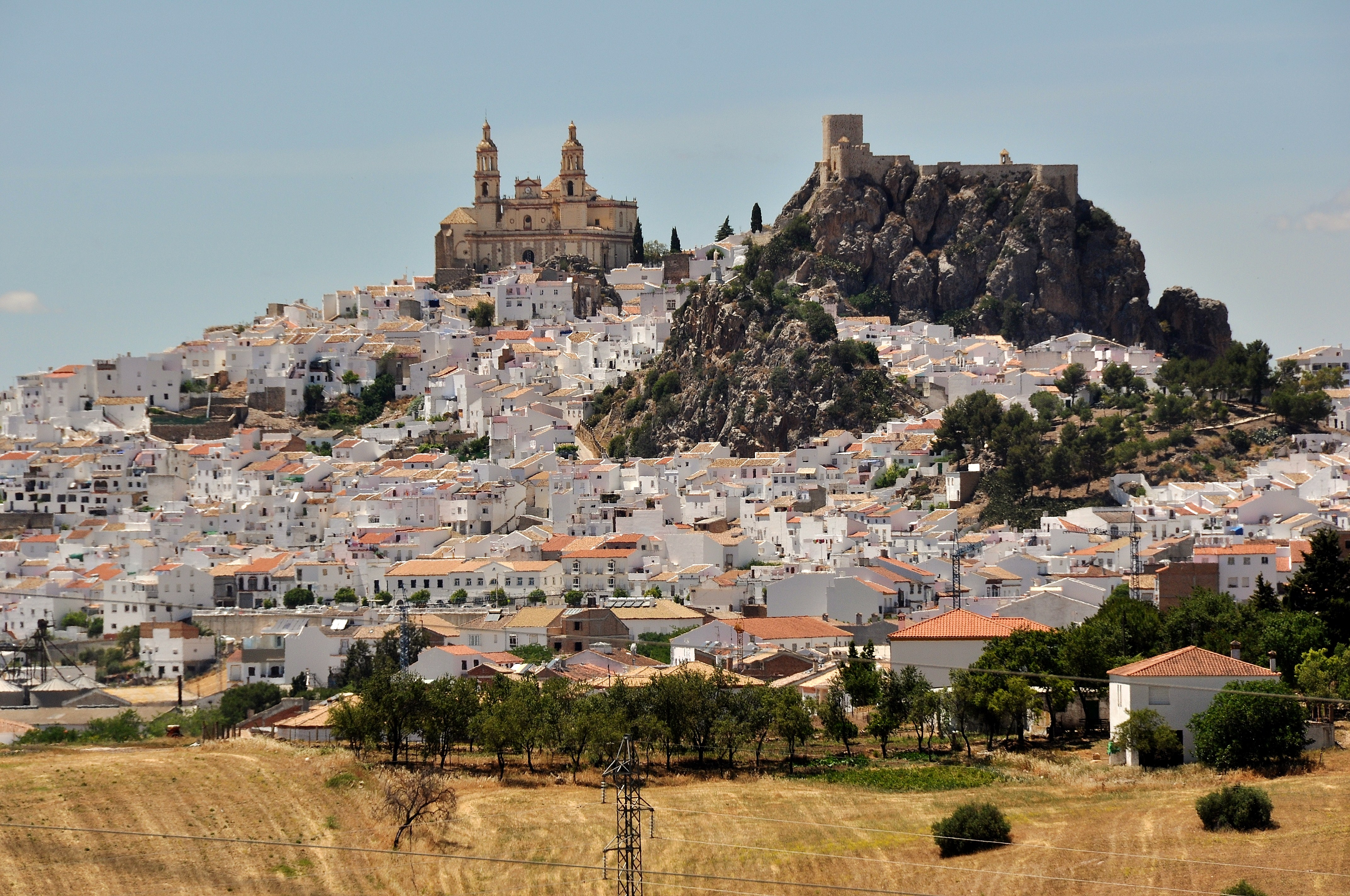 OLVERA